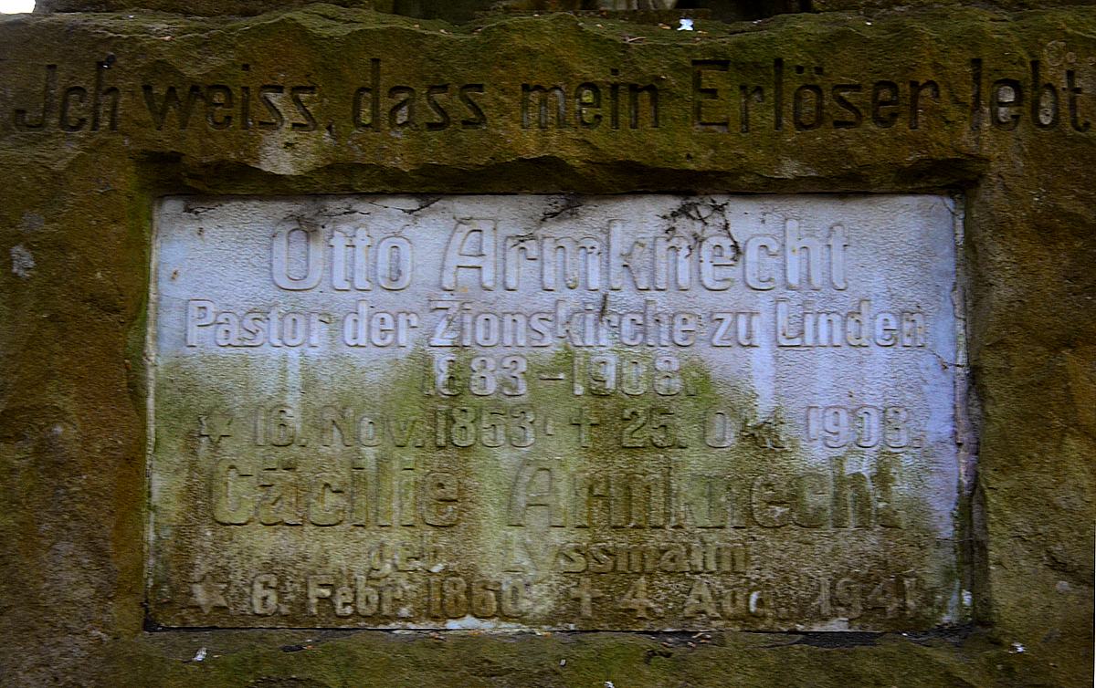 Inschriftentafel am Ehrengrab für den an der ehemaligen Zionskirche in Linden tätig gewesenen Armenpastor Otto Armknecht (* 16. November 1853; † 25. Oktober 1908) und die Cäcilie geborene Lysmann (* 6. Februar 1860; † 4. August 1941) ...